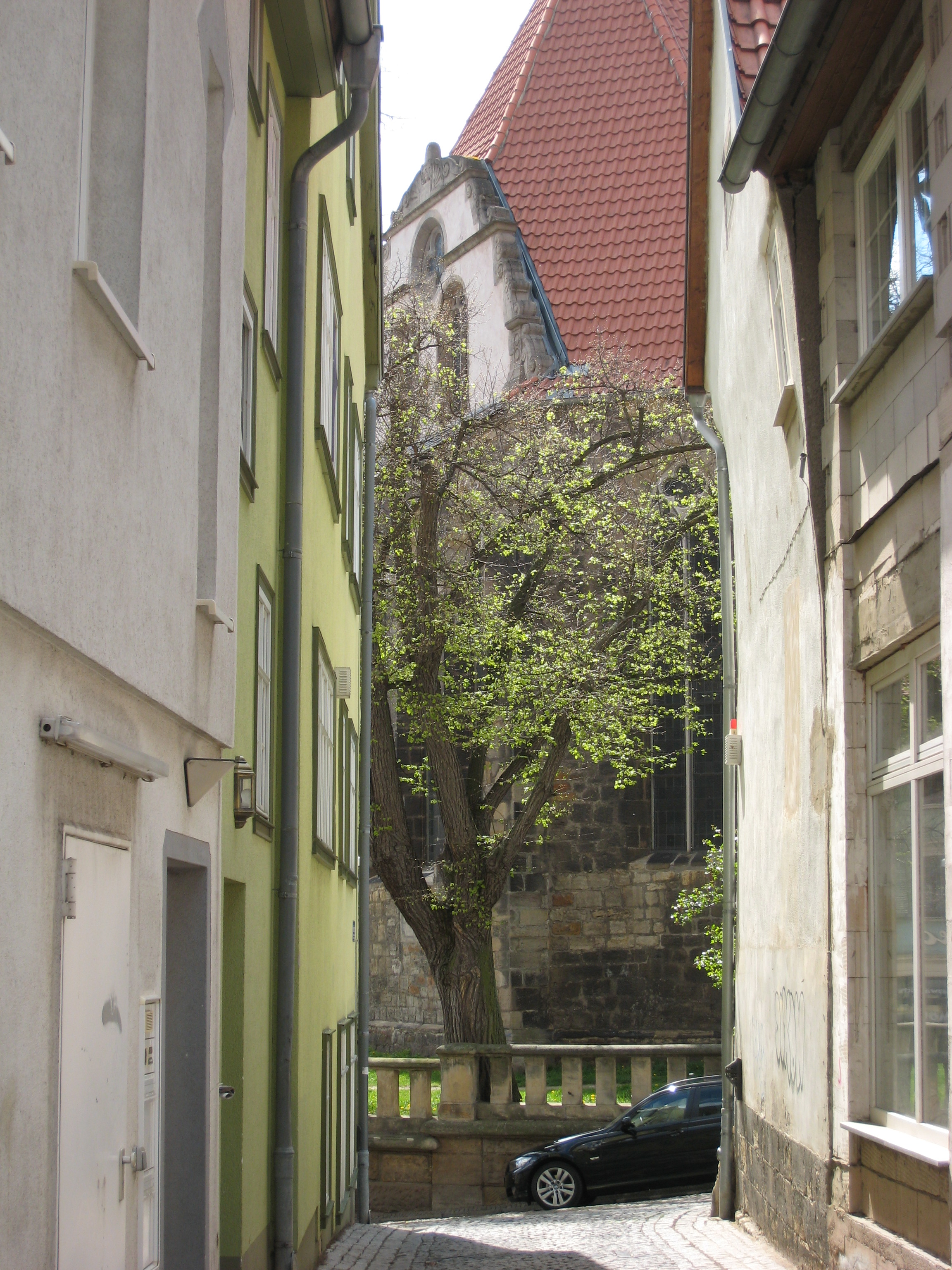 Die Friedhofgasse in Arnstadt, im Hintergrund der Chor der Bachkirche.